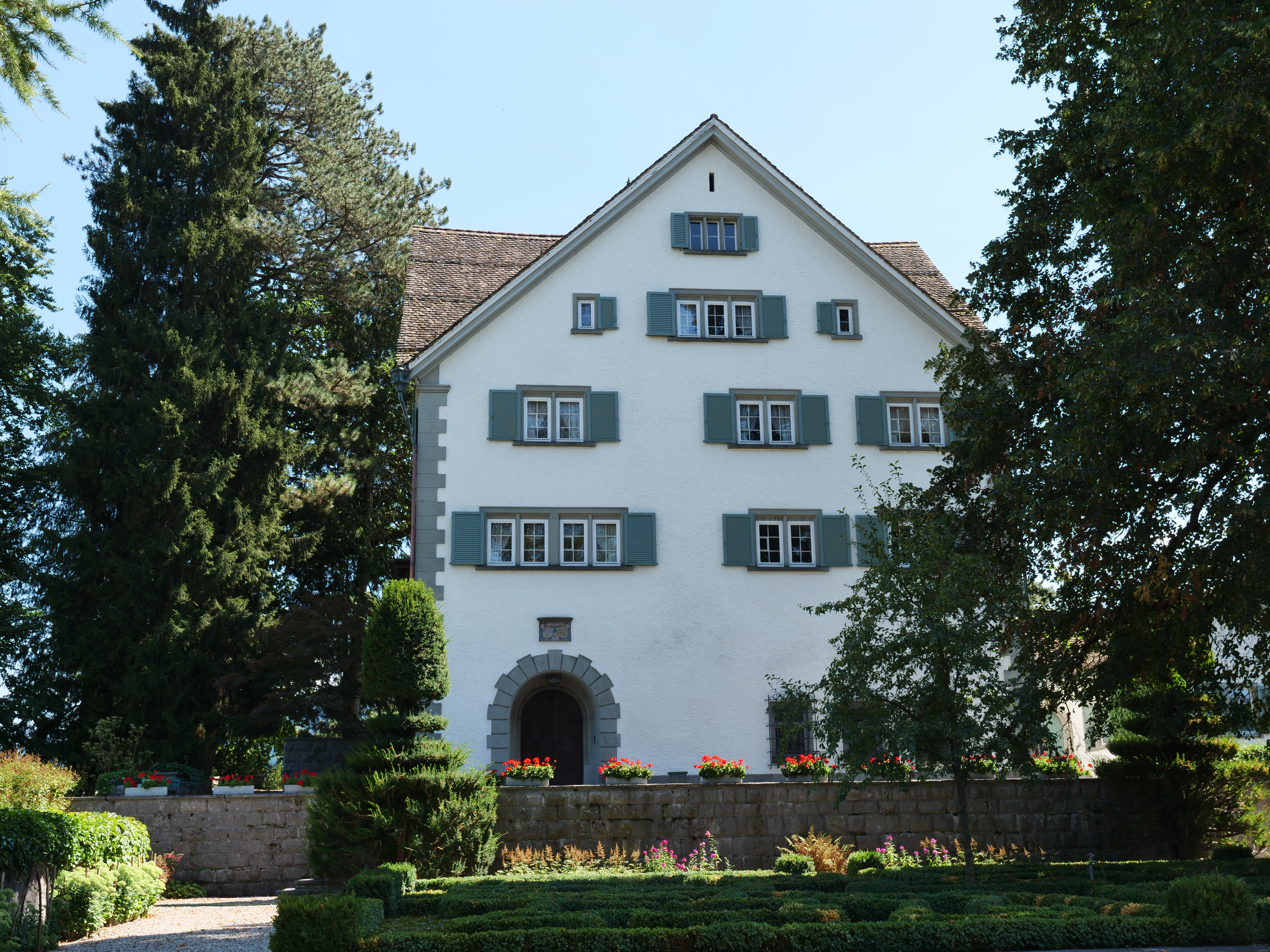 Das stattliche Bürgerhaus Felsenstein, wurde im Jahr 1624 erbaut.